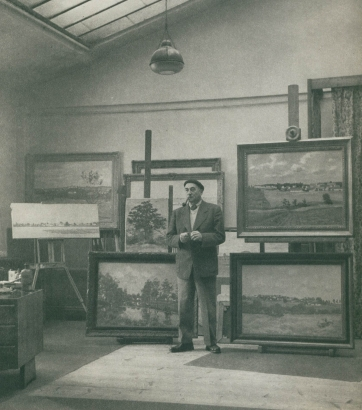 Václav Vojtěch Novák (1901-1969), český akademický malíř, ilustrátor a typograf